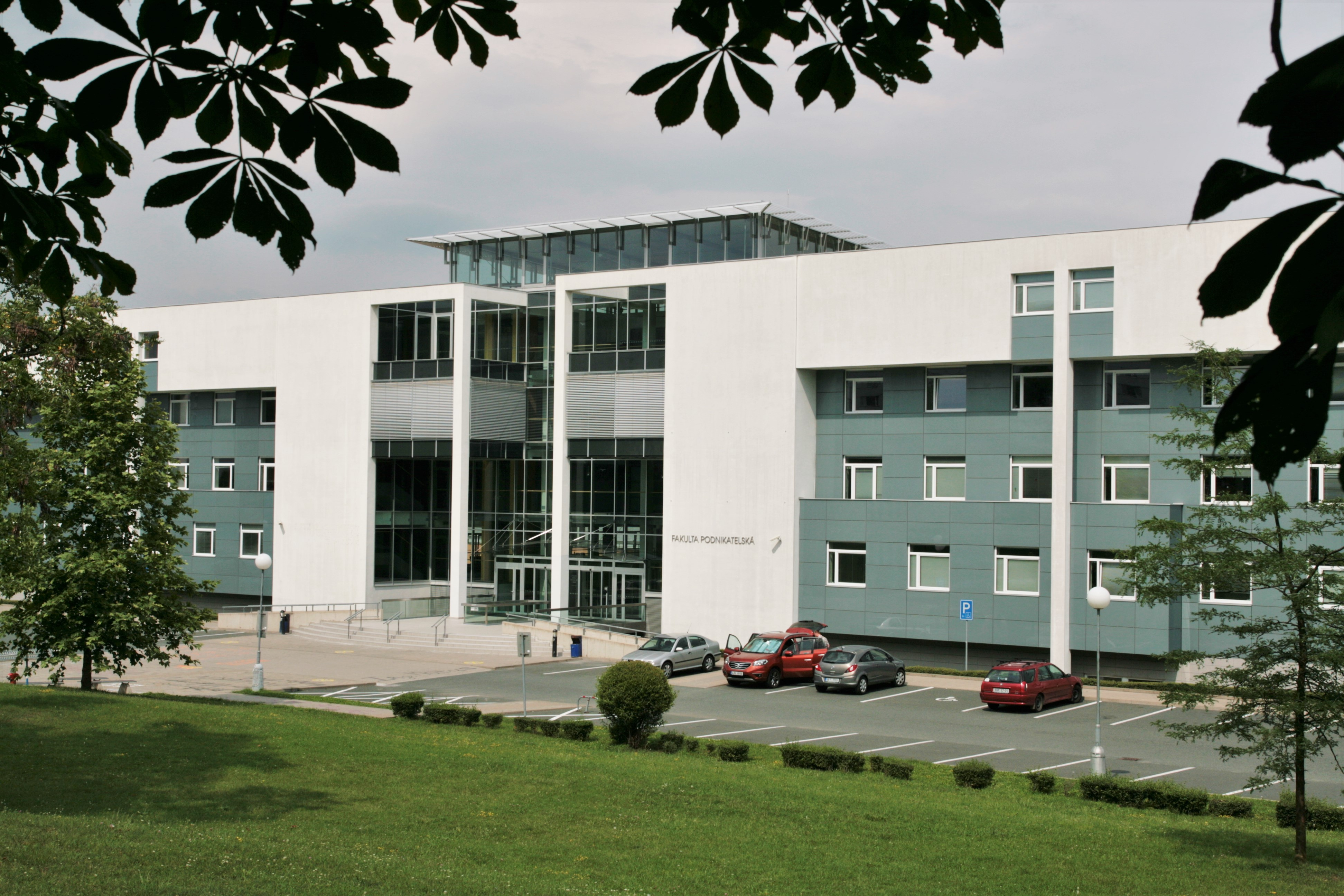 Fakulta podnikatelská Vysokého učení technického v Brně, Kolejní 2906/4, Brno-Královo Pole.